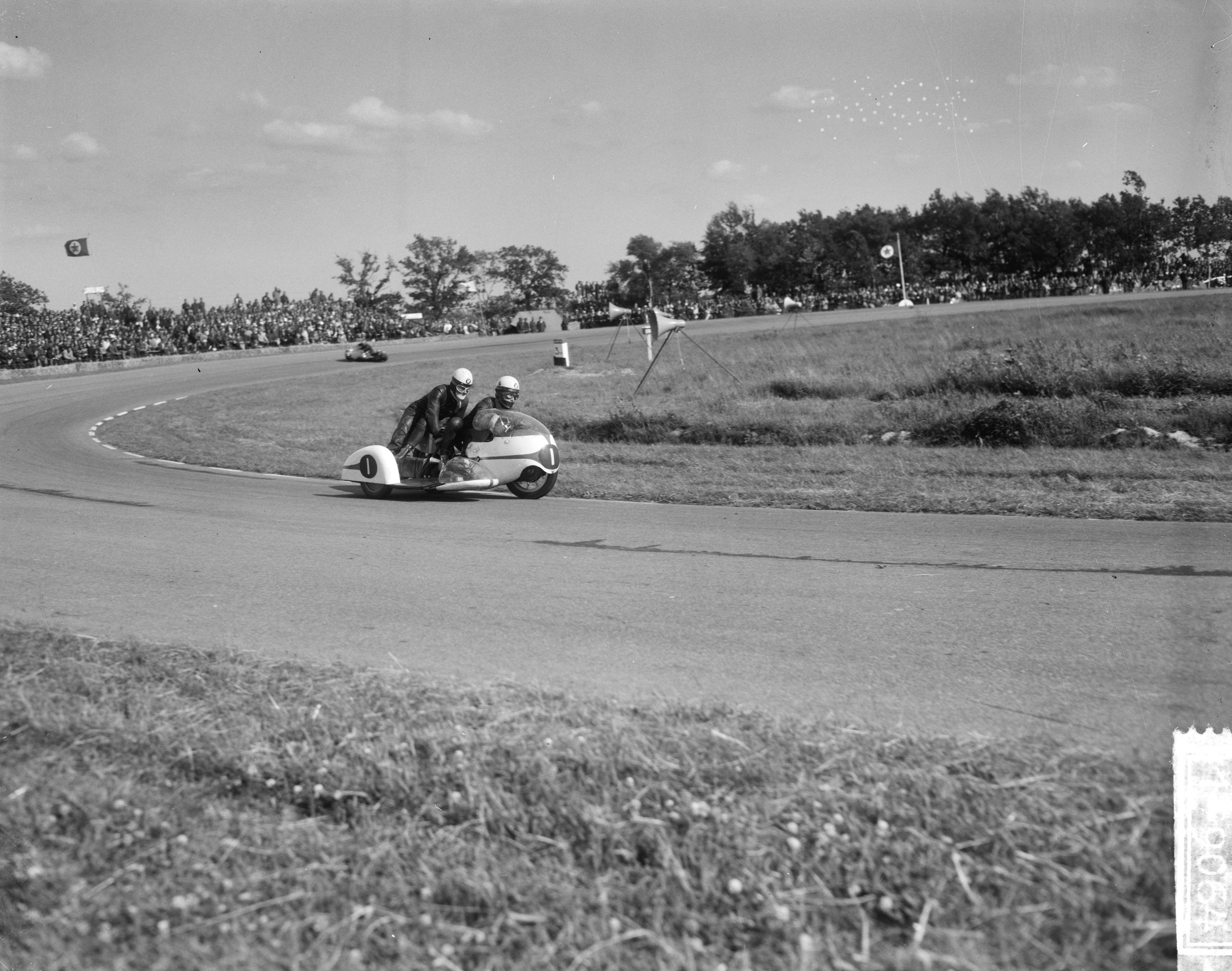 Collectie / Archief : Fotocollectie Anefo Reportage / Serie : TT Assen 1965 Beschrijving : Zijspanrace. Max Deubel / Emil Hörner? Datum : 26 juni 1965 Locatie : Assen Trefwoorden : ACTIES, motorsport Instellingsnaam : TT Fotograaf : Bilsen, Joop van / Anefo Auteursrechthebbende : Nationaal Archief Materiaalsoort : Negatief (zwart/wit) Nummer archiefinventaris : bekijk toegang 2.24.01.04 Bestanddeelnummer : 917-9064